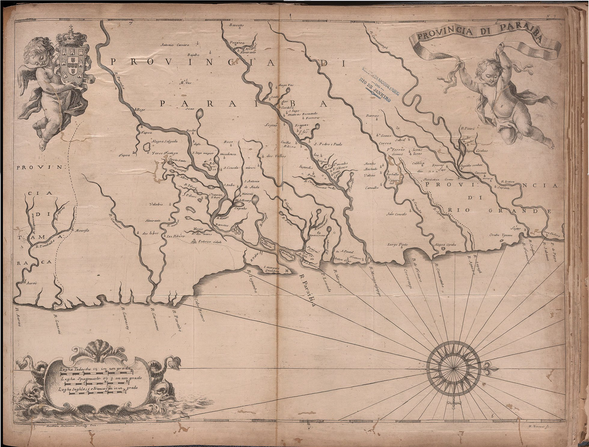 Mapa da Pronvíncia da Paraíba.